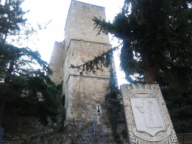 Torre di San Berardo alla cui base si trova la tomba di Ignazio Silone